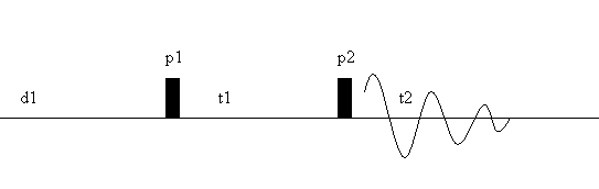 COSY NMR pulse diagram